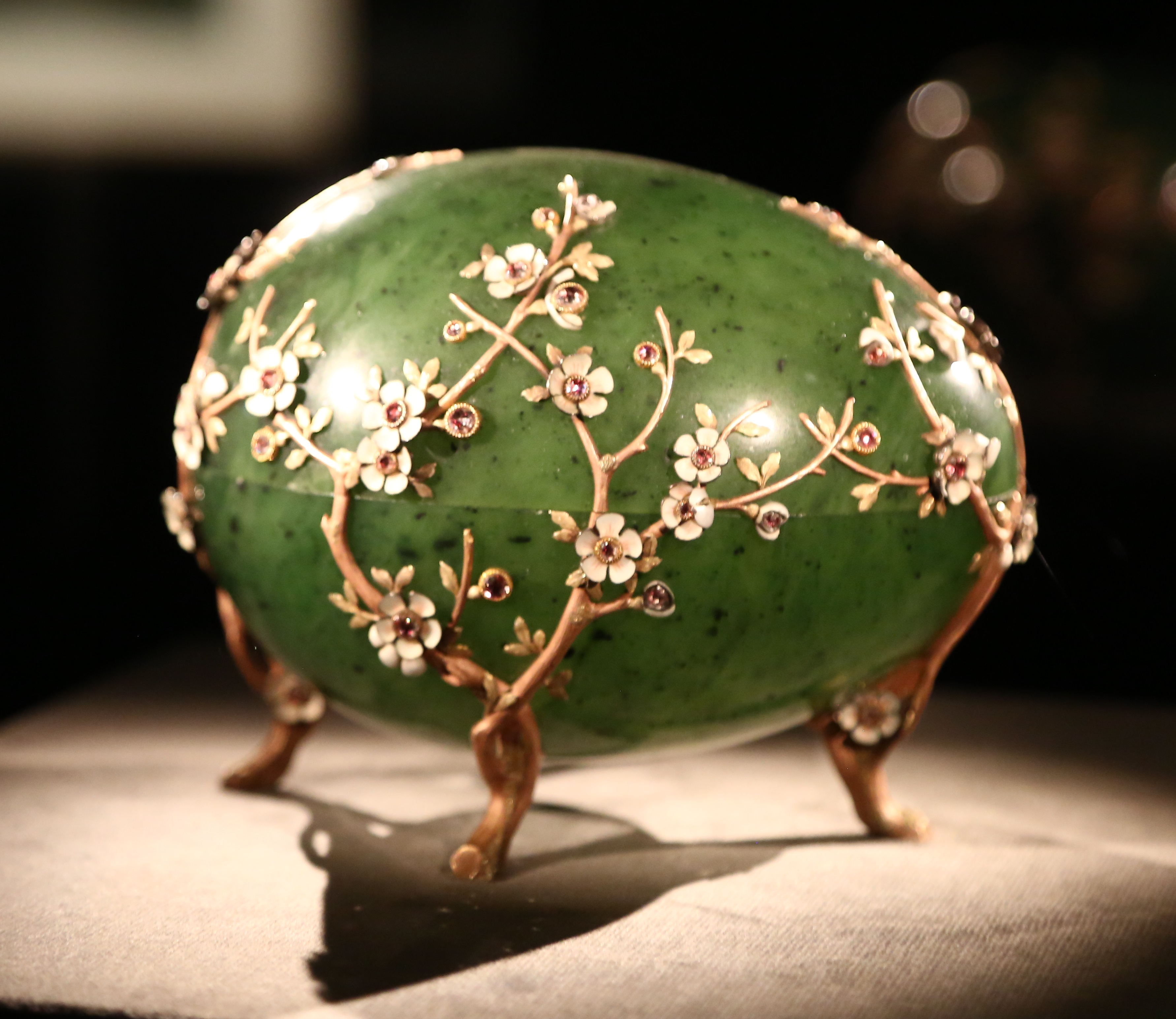 L'Uovo dei fiori di melo è un uovo di Pasqua gioiello che fu fabbricato a San Pietroburgo nel 1901 sotto la supervisione di Michael Perkhin, per conto del gioielliere russo Peter Carl Fabergé al quale era stato ordinato da Alexander Kelch per farne dono a sua moglie, l'ereditiera Barbara Kelch.